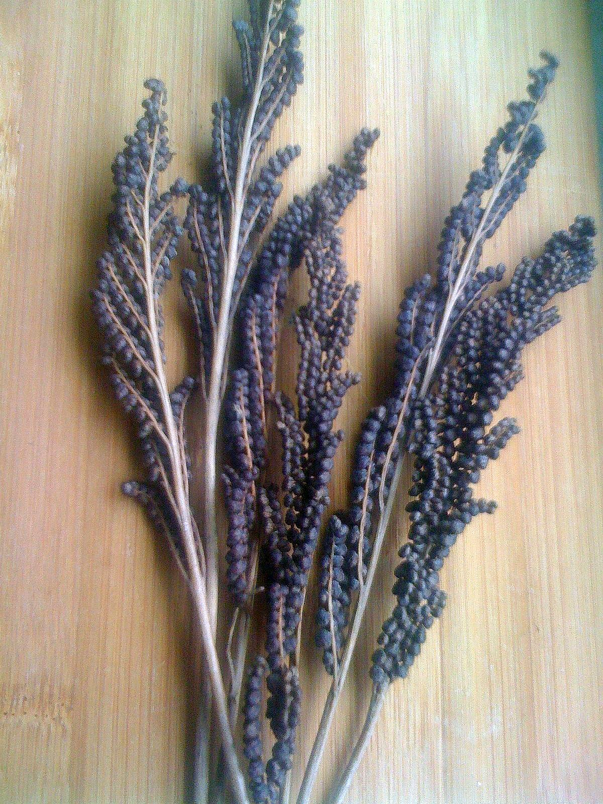 Fougère Onoclea sensibilis / onoclée sensible / bead fern